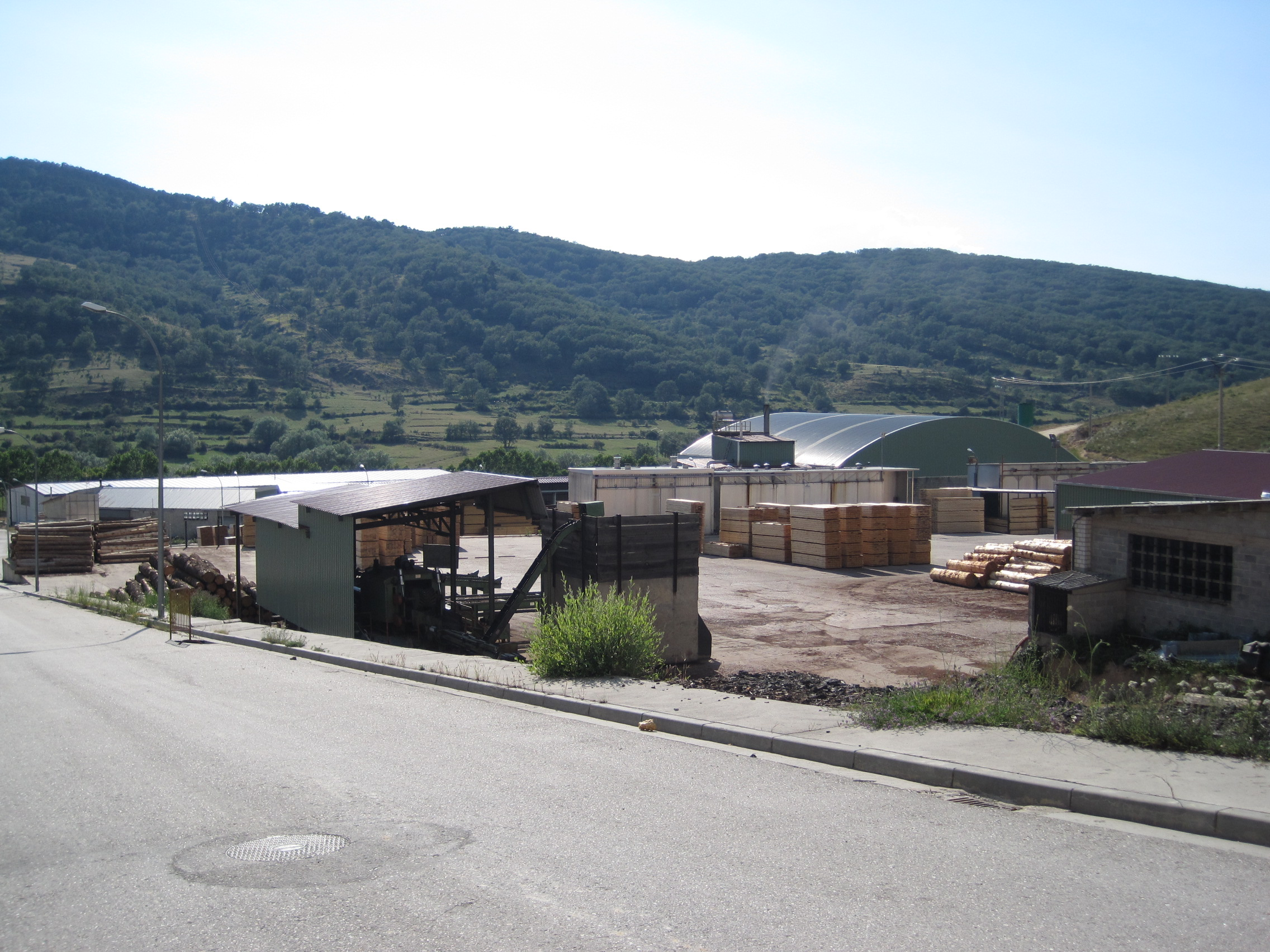 Vista de la zona industrial de Canicosa de la Sierra (Burgos, España).